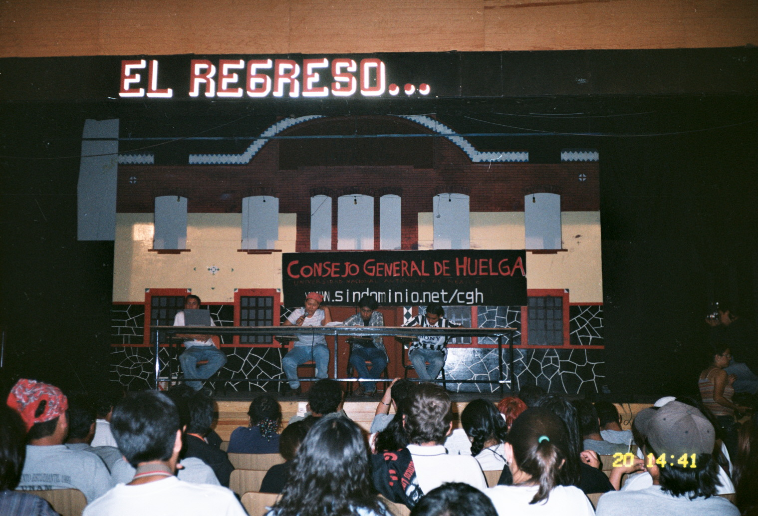 Reunión estudiantil durante la huelga en el Mexe, Hidalgo, México. Photo taken in UNAM, CU, Mexico City. Students conflict in 1999-2000. SPANISH: Foto tomada en la UNAM, CU, Ciudad de México. Durante la Huelga del CGH en la UNAM de los años 1999-2000.